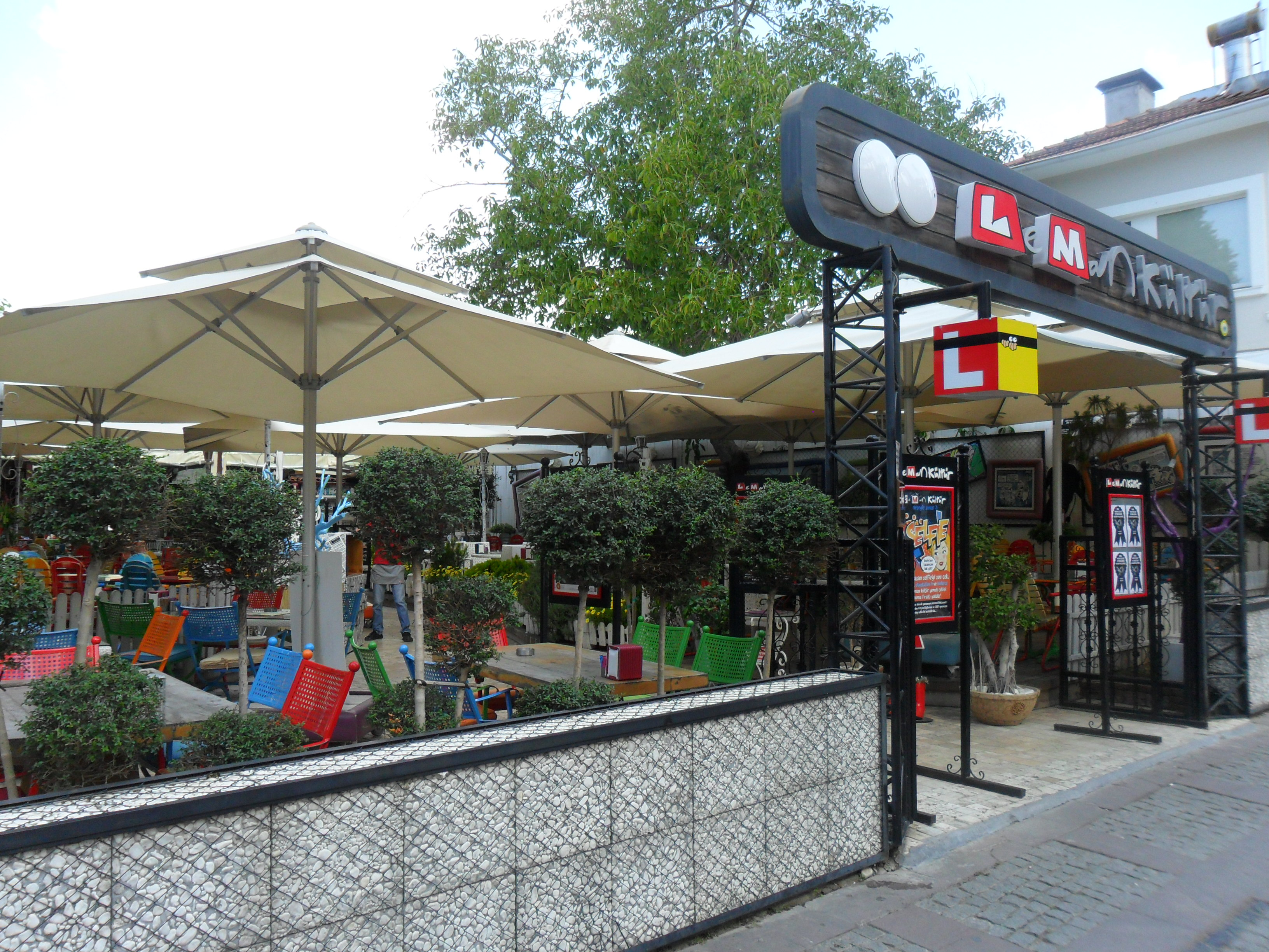 Antalya'da yer alan Leman Kültür.